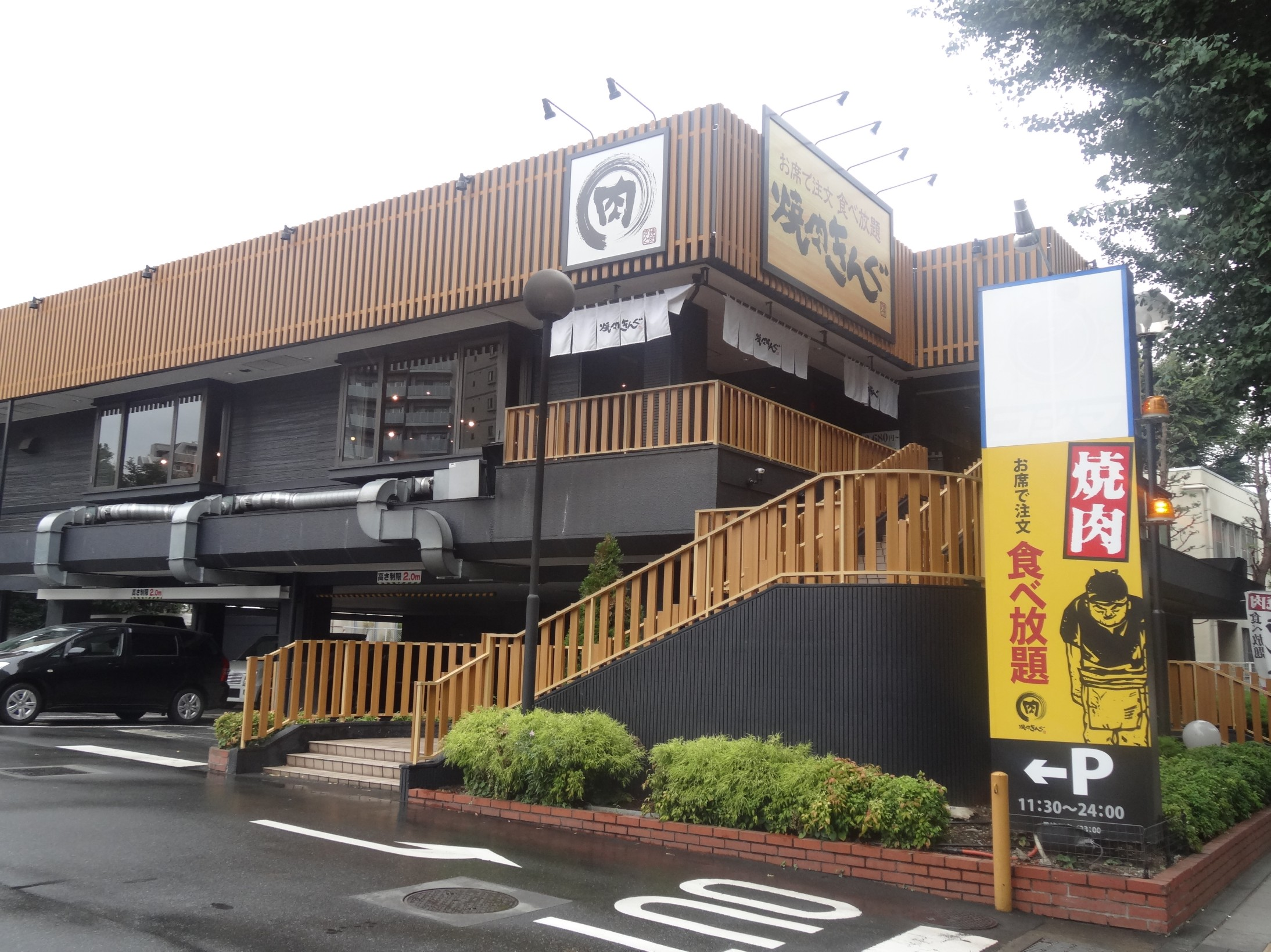 焼肉きんぐ府中店外観